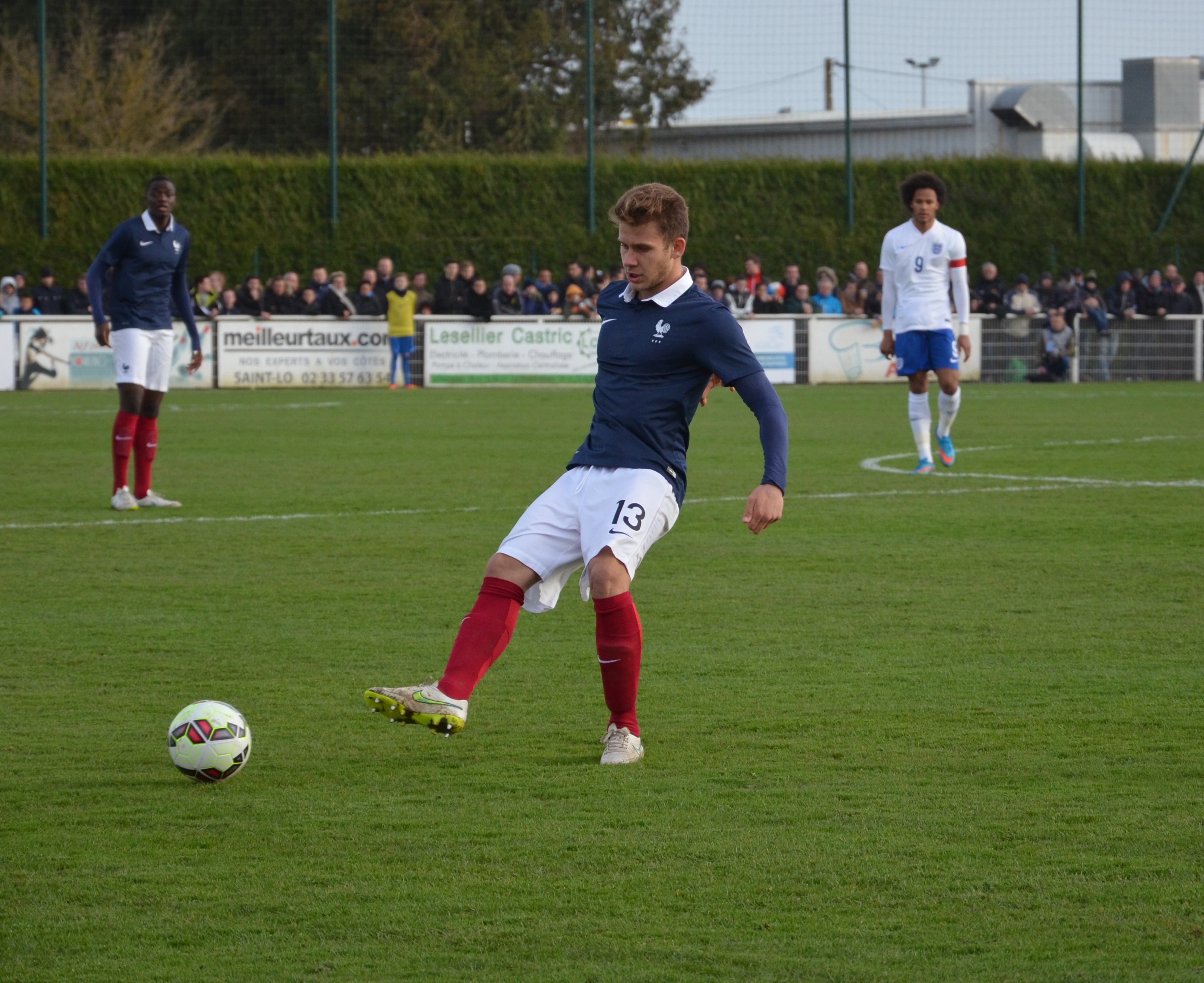 Photographie prise lors du match opposant la France à l'Angleterre pour les qualifications du championnat d'Europe de football des moins de 19 ans 2015 au stade Louis-Villemer de Saint-Lô le 31 mars 2015. Ici, Alexis Blin